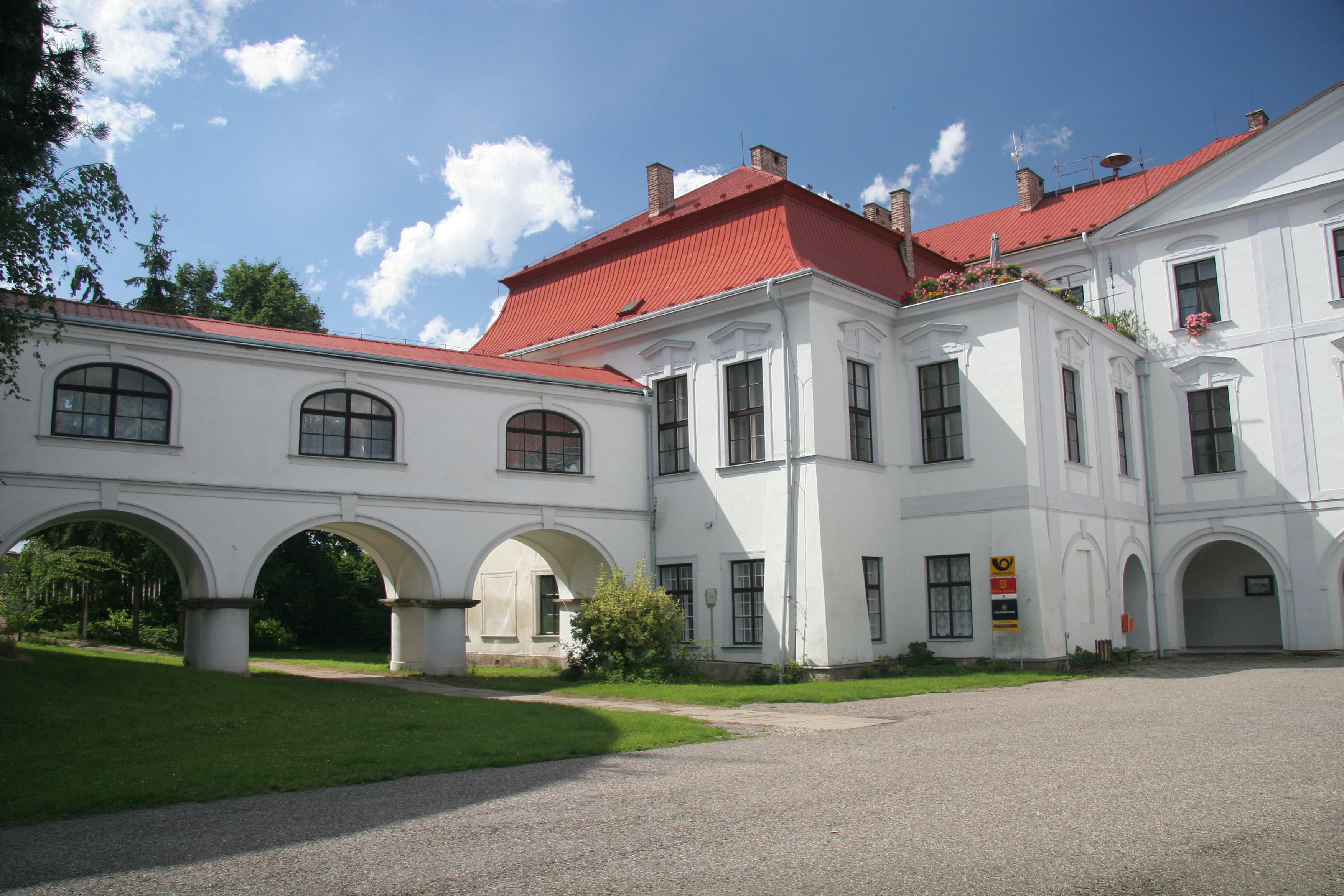 Zámek Cerekvice nad Bystřicí, Cerekvice nad Bystřicí 1